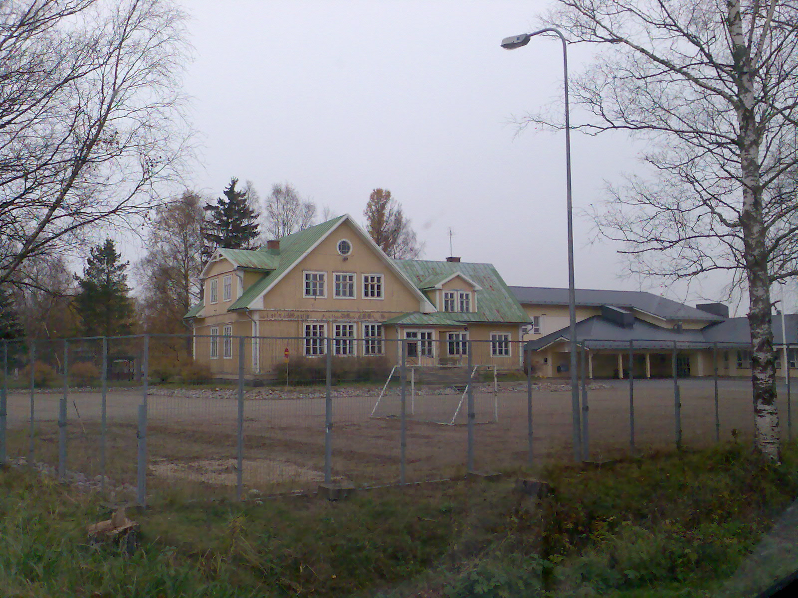 Kauhajoen Kainaston koulurakennus